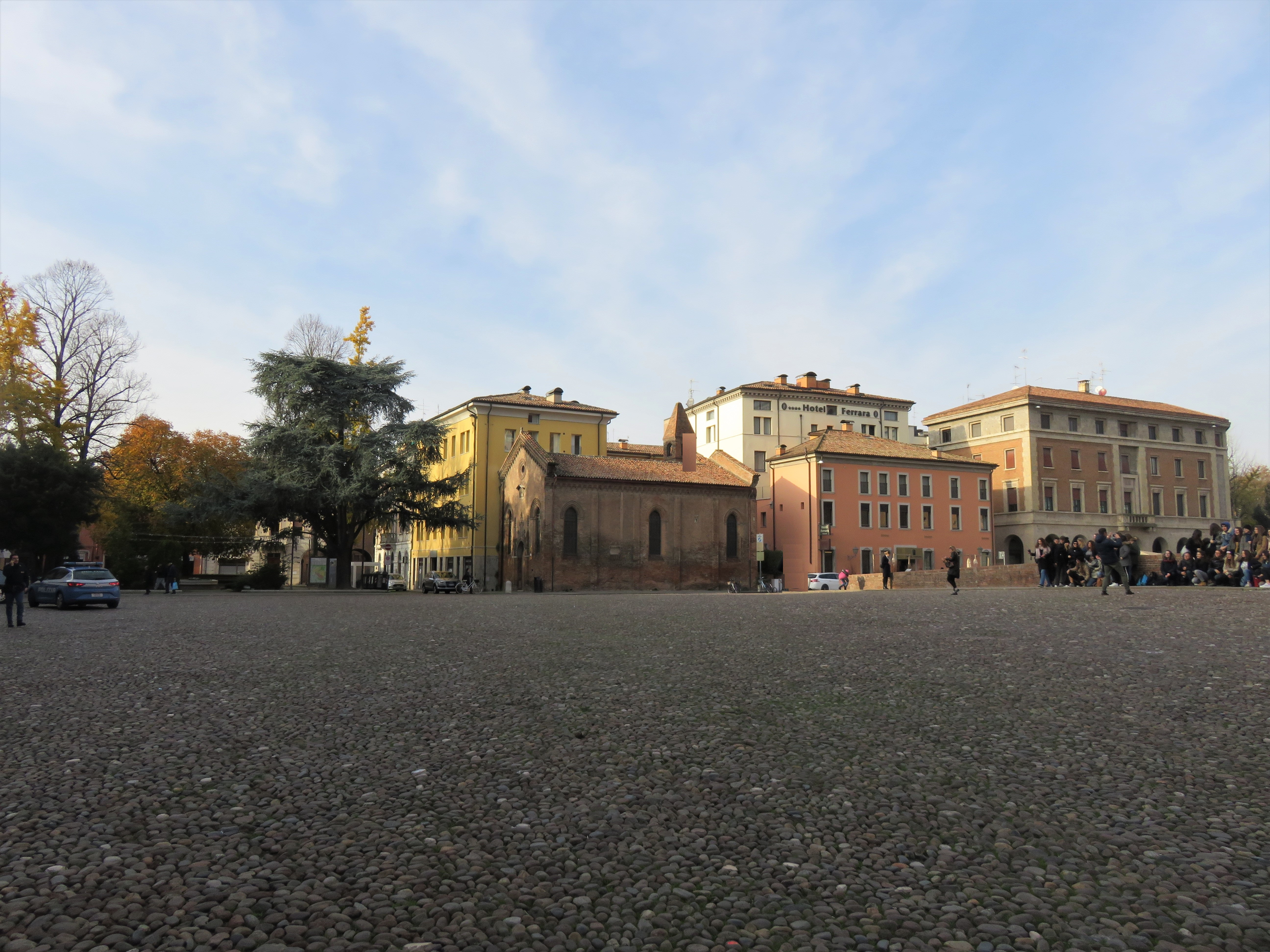 Vista d'insieme verso piazzetta Repubblica